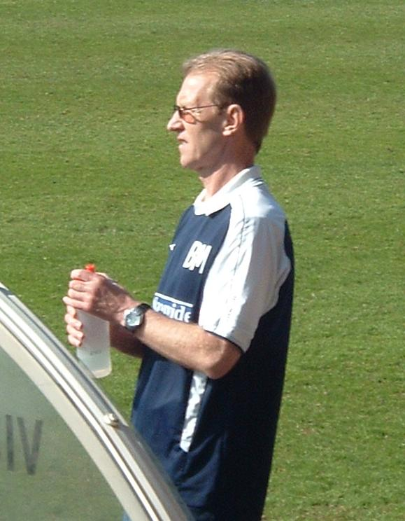 Billy McEwan.